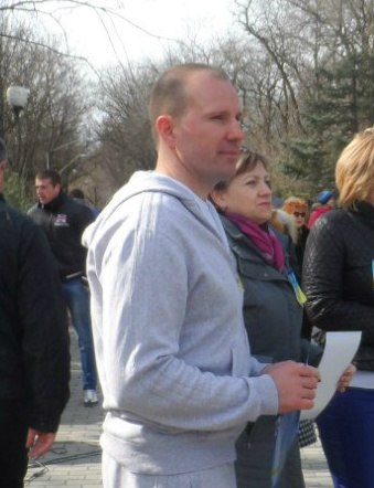 городской голова